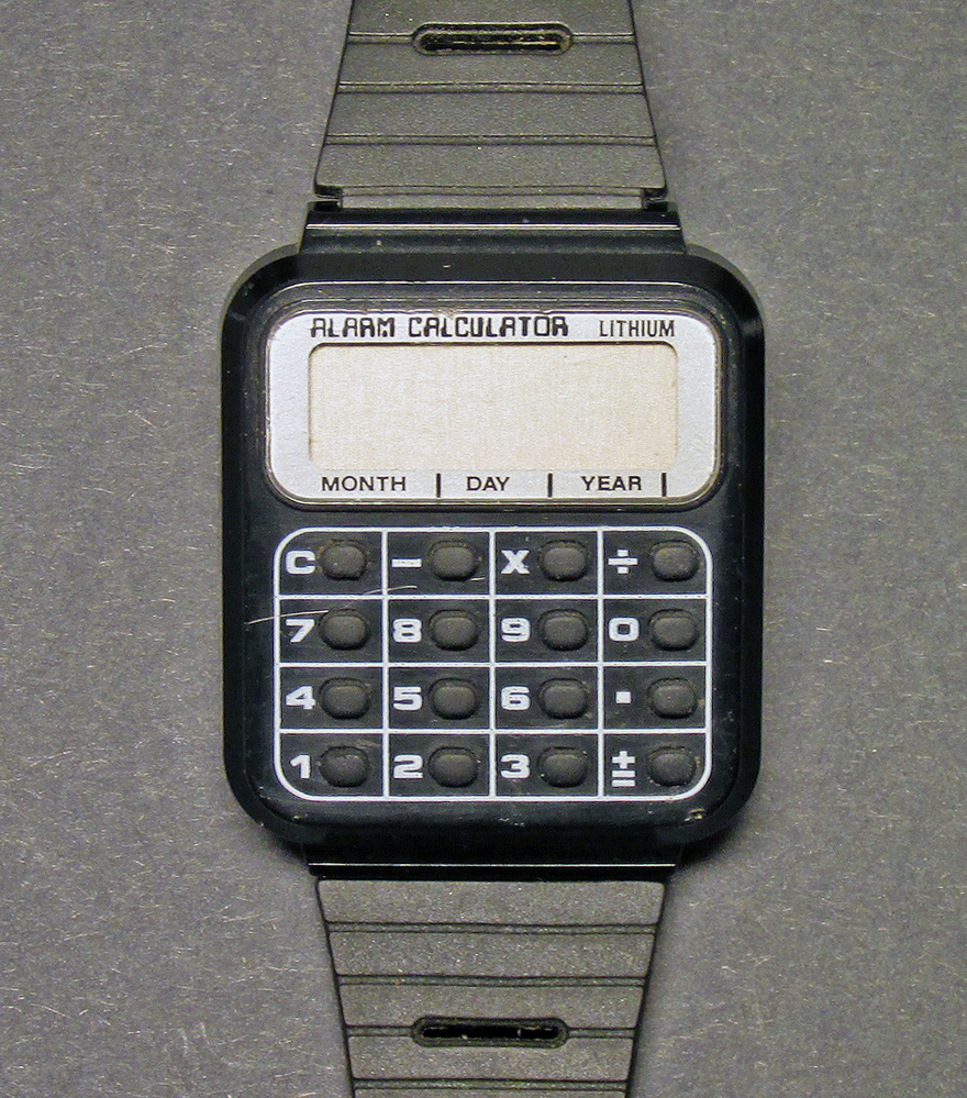 Digitalklocka med LCD display och div olika funktioner. 1988.